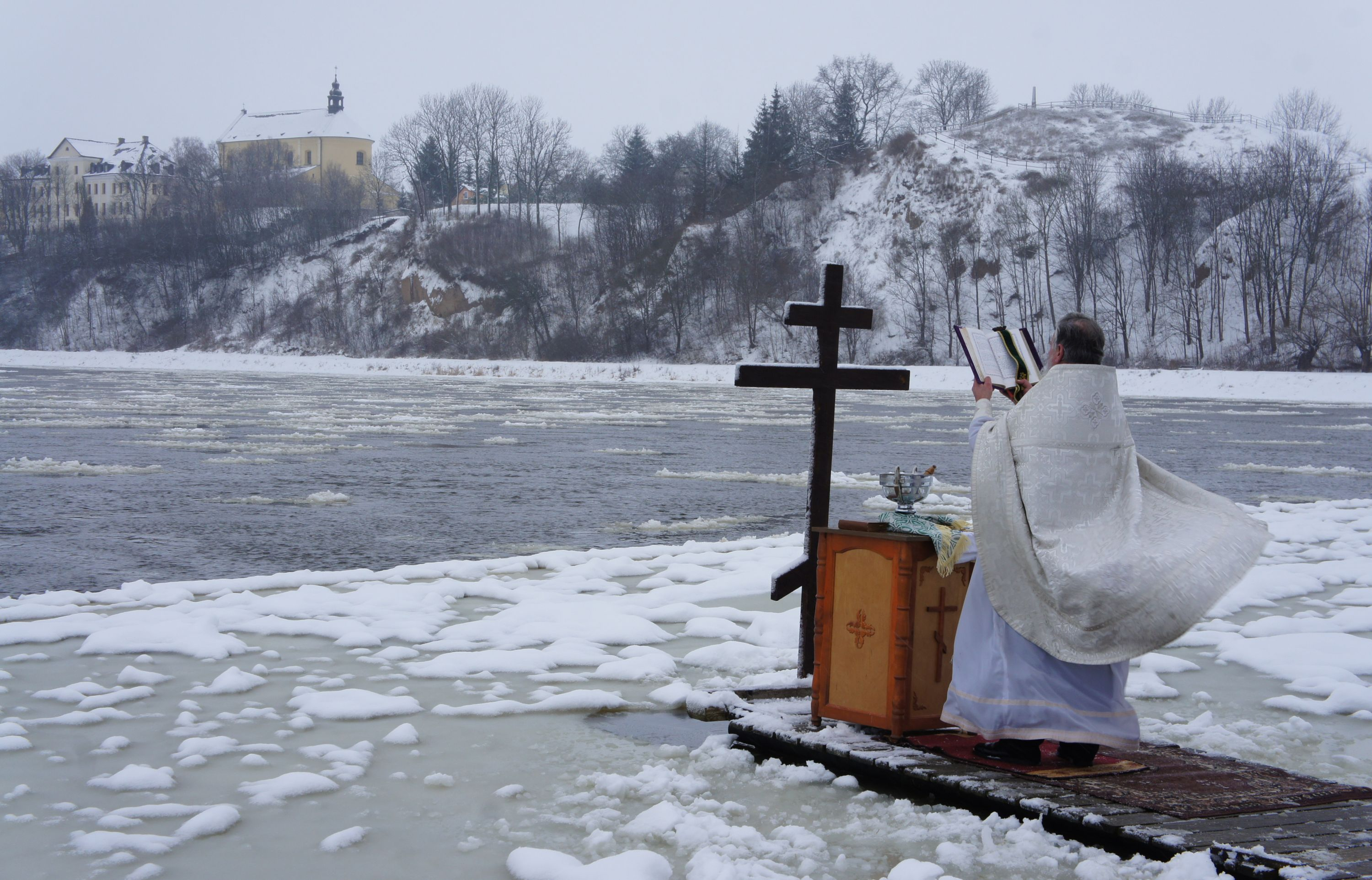 Święto Jordanu w Drohiczynie (19 stycznia 2018).